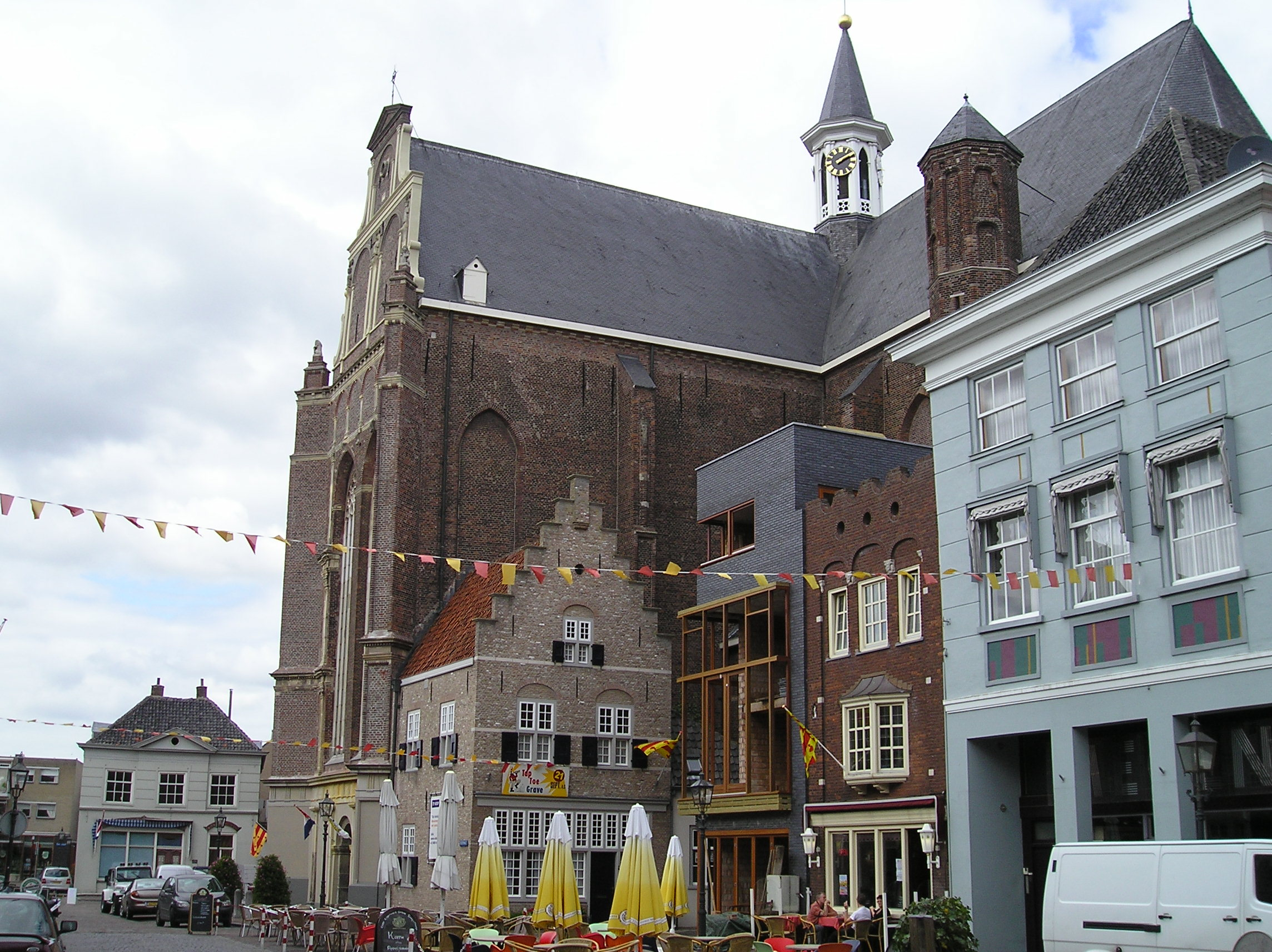 Sint Elisabethskerk Grave - buiten vanaf Markt